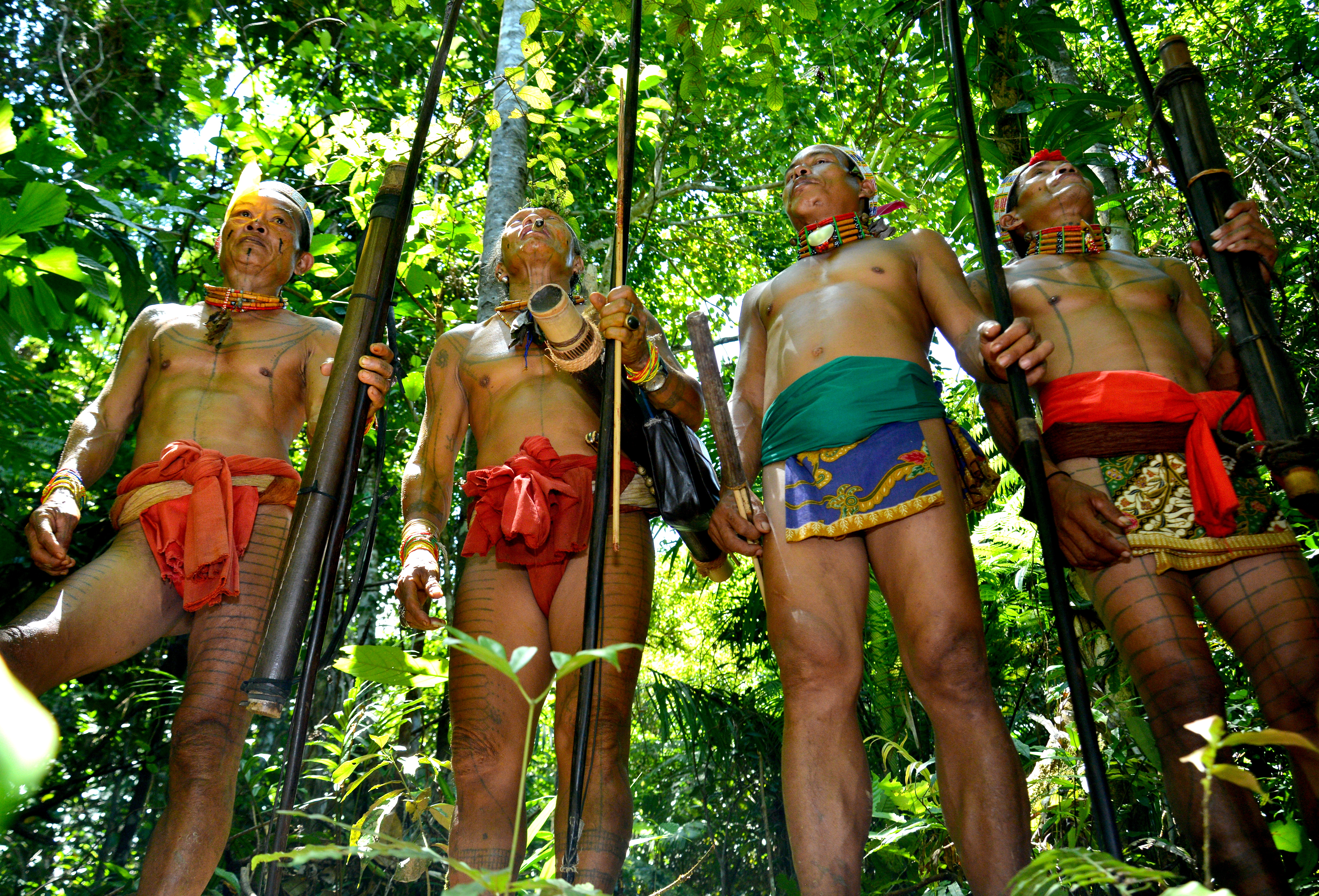 Sikerei adalah Dukun Pengobatan yang Pandai Menari di Kepulauan Mentawai. Jika sakit, orang biasanya pergi ke dokter atau ke ahli pengobatan alternatif untuk menyembuhkan penyakit. Namun berbeda dengan masyarakat di pedalaman Kepulauan Mentawai, Kecamatan Siberut Selatan, Kapubaten Kepulauan Mentawai, Sumatra Barat.